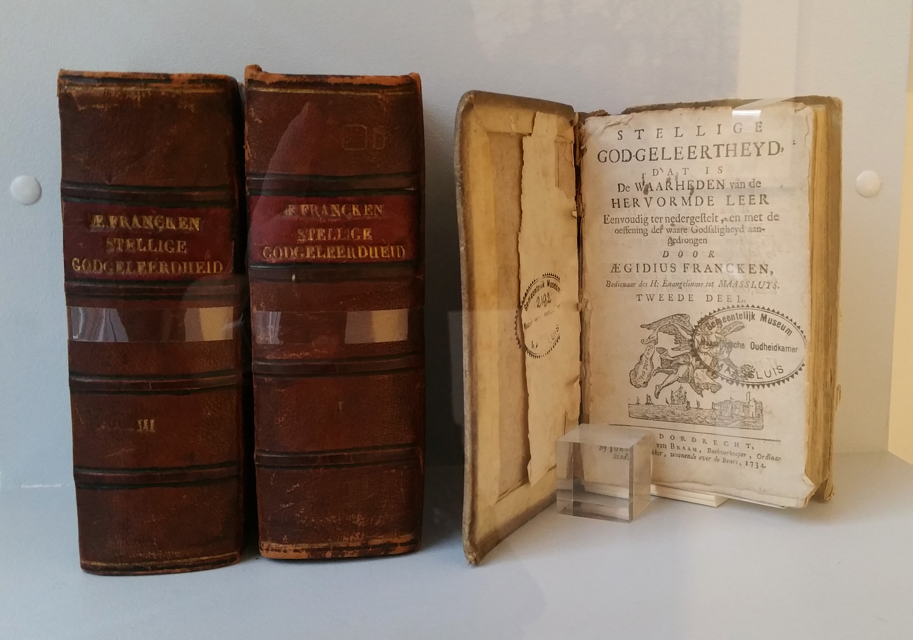 Drie delen van de van Stellige God – Geleertheyd van de Hervormde leer Van Aegidius Francken, bedienaar der H.Euangeliums tot Maassluis. 1734. Collectie:Museum Maassluis